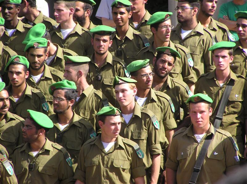 Ceremony of receiving berets. IDF Nahal brigade.Zeremonie zur Verleihung der grünen Baretts. (Nachal-Brigarde der Israelischen Verteidigungstreitkräfte) טקס הענקת הכומתה הירוקה של גדודי חטיבת הנח"ל